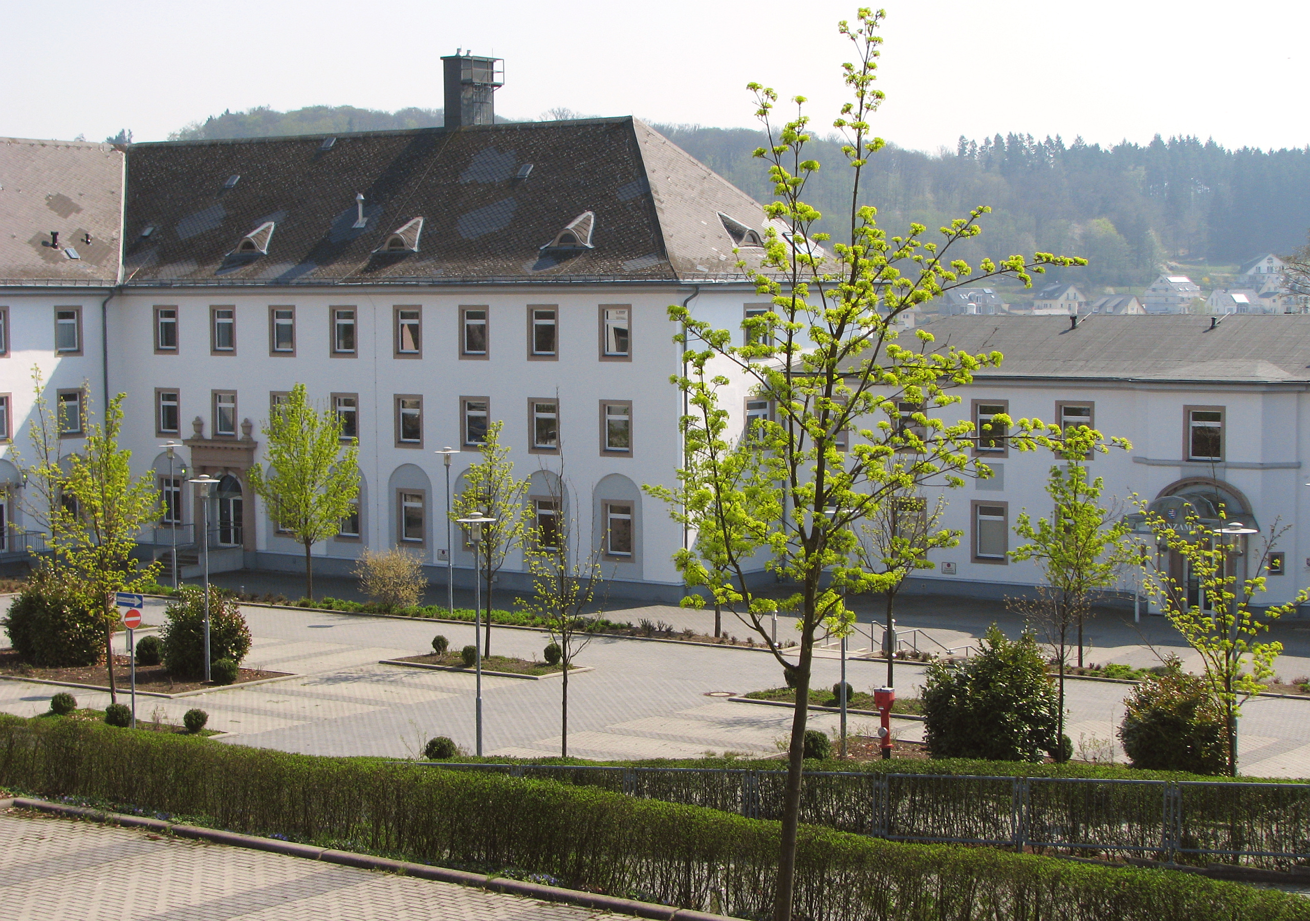 Das Finanzamt im Behördenzentrum in der Emser Str in Bad Schwalbach, Hessen - Foto Wolfgang Pehlemann IMG_4606